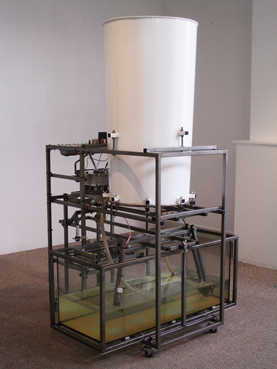 Waterharpet V2.02 Akoestisch instrument dat staande golven in water hoorbaar maakt.